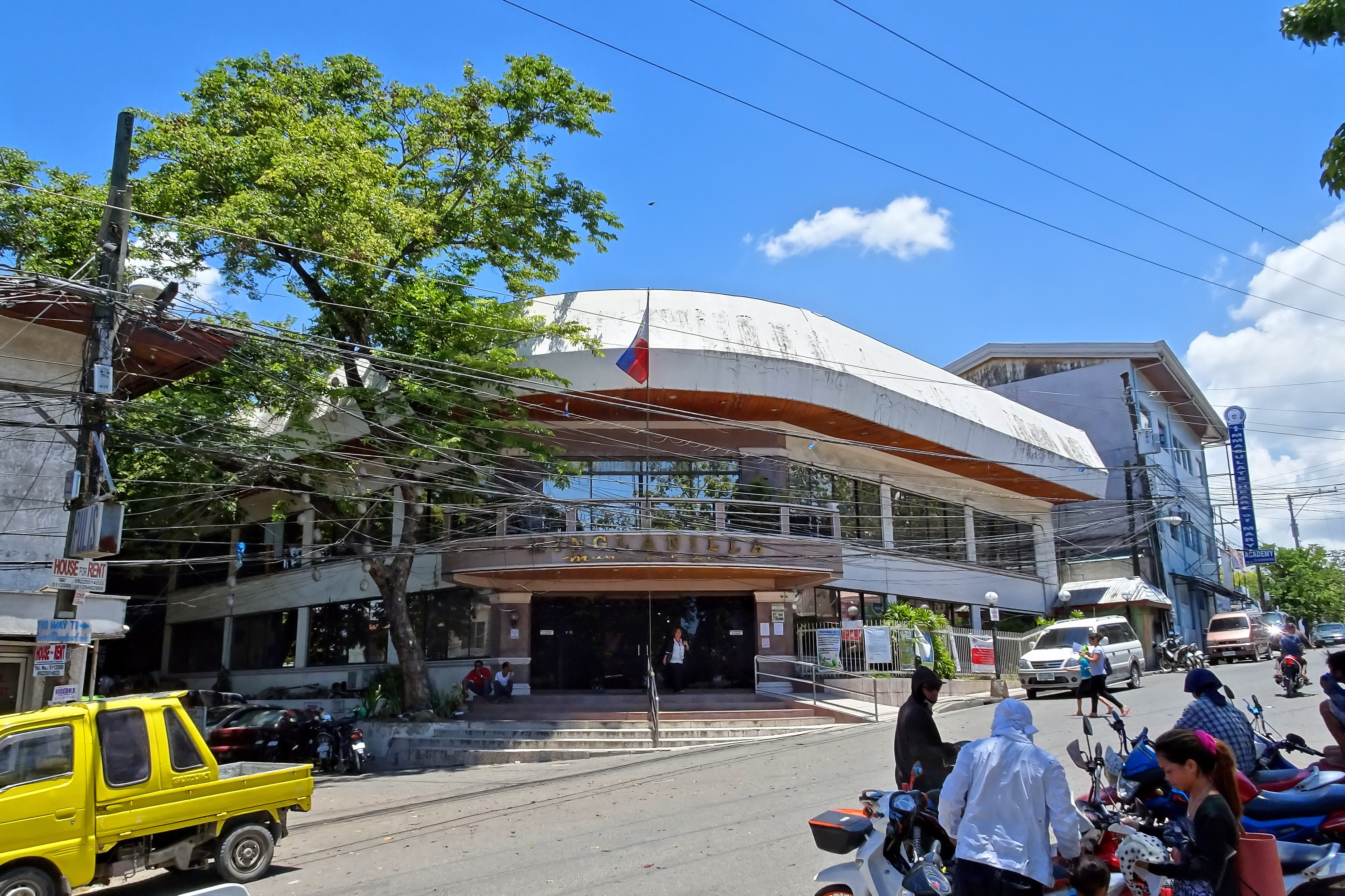 Minglanilla, Cebu, Philippines